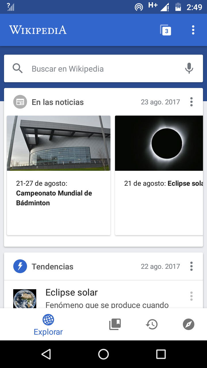 Wikipedia desde un dispositivo Android